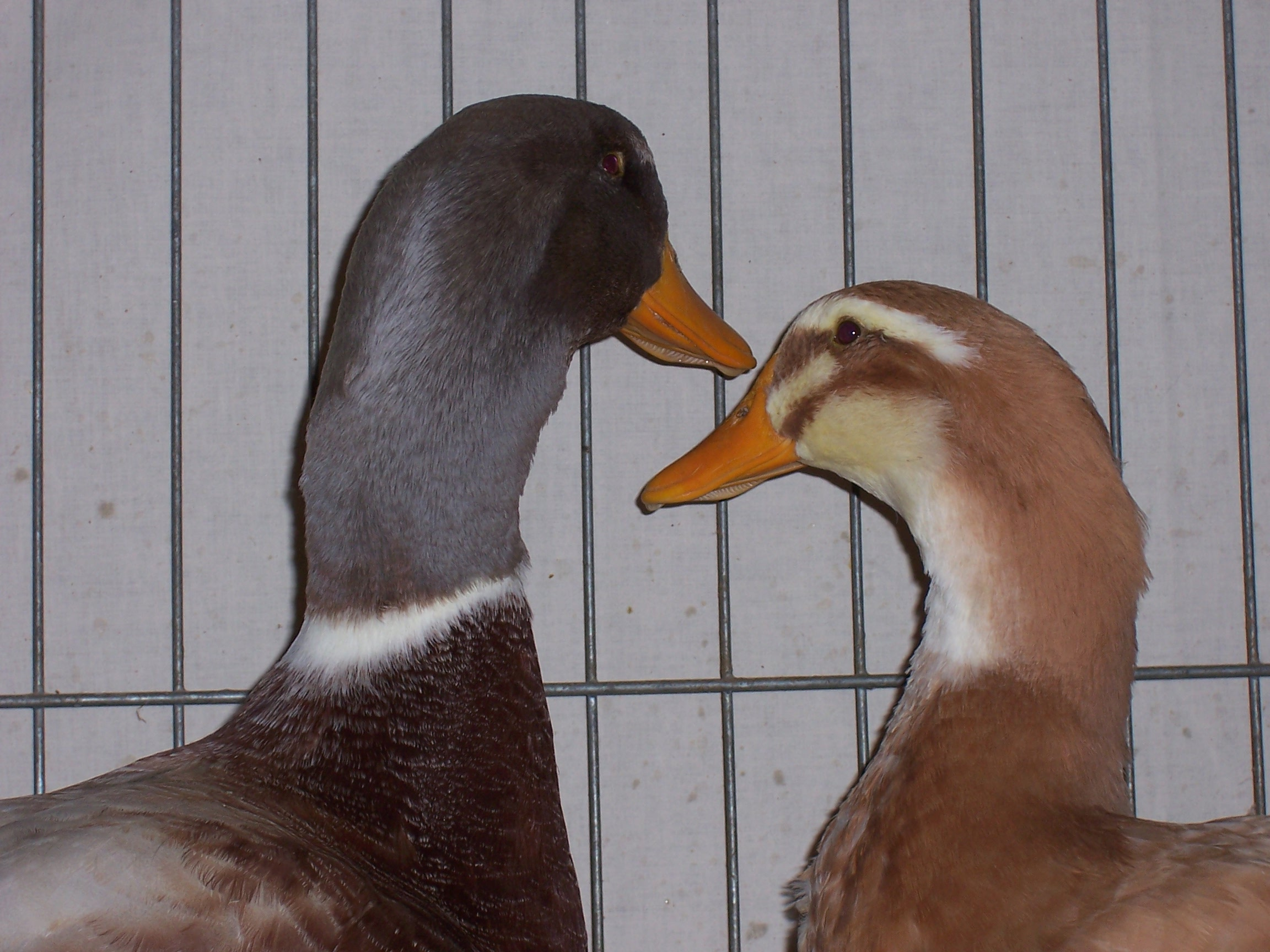 Kopfstudie der Sachsenenten